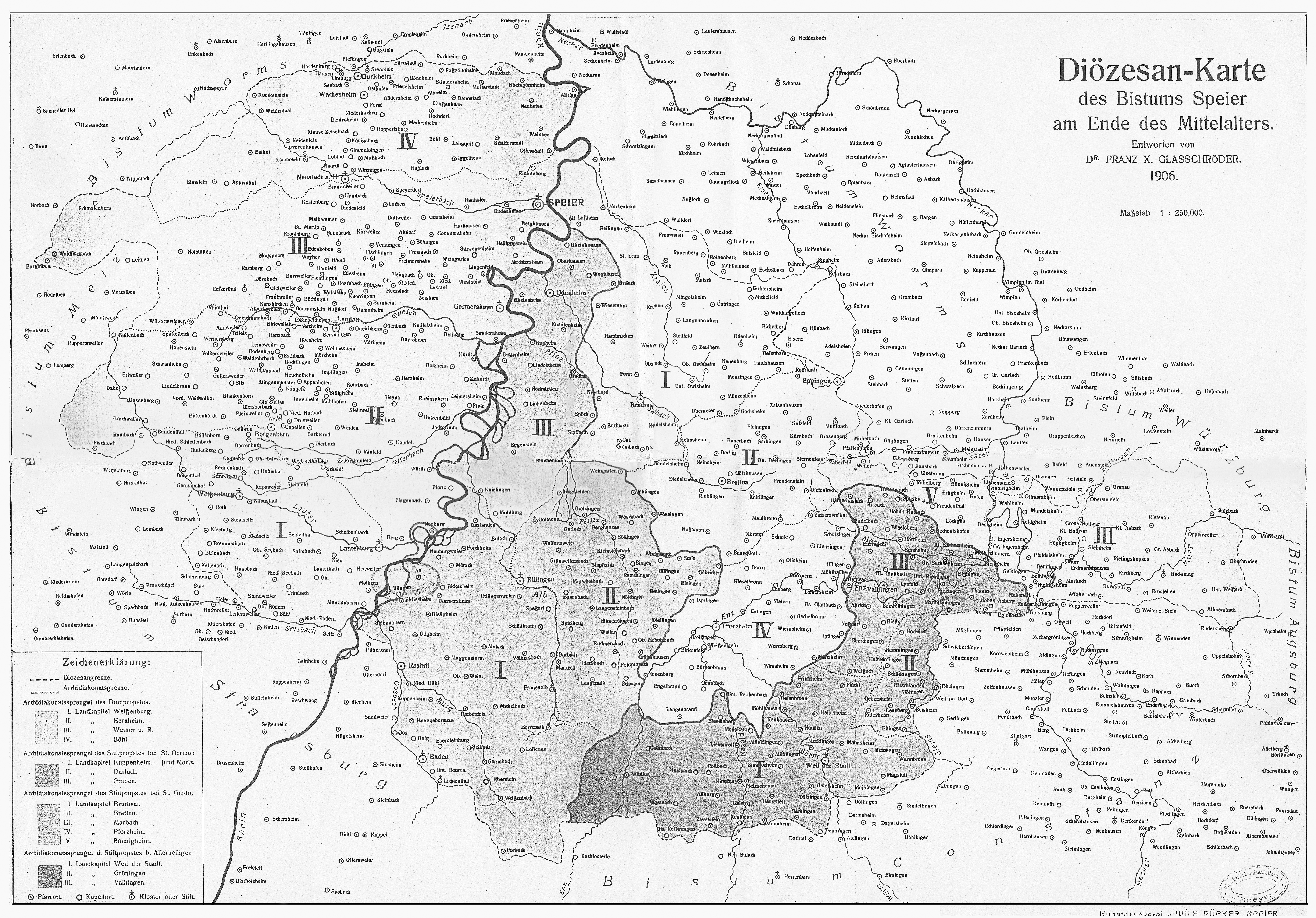 "Diözesan-Karte des Bistums Speyer am Ende des Mittelalters" mit Unterteilung in Archidiakonate und Landkapitel